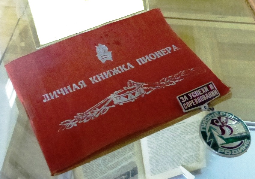 Личная книжка пионера